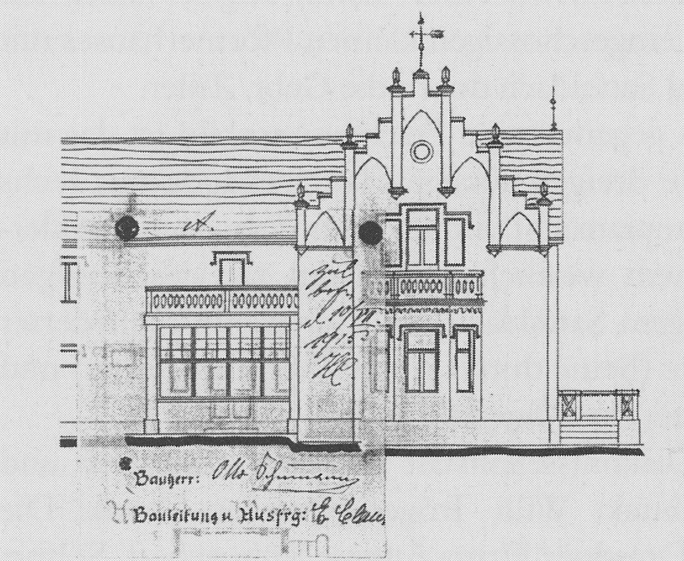 Radebeul Heinrich-Zille-Straße 5 Bauzeichnung 1915